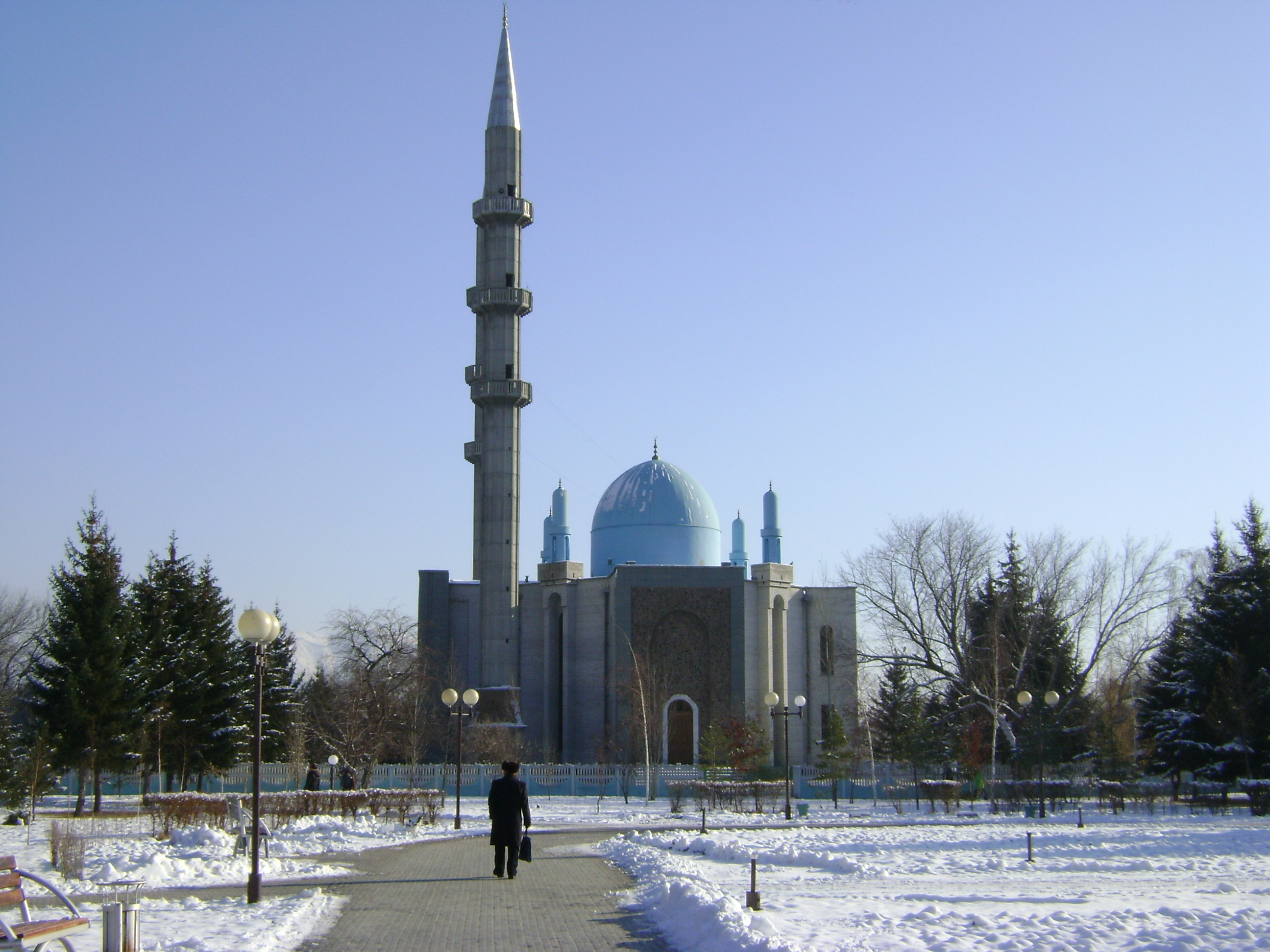 Мечеть на площади. Усть-Каменогорск